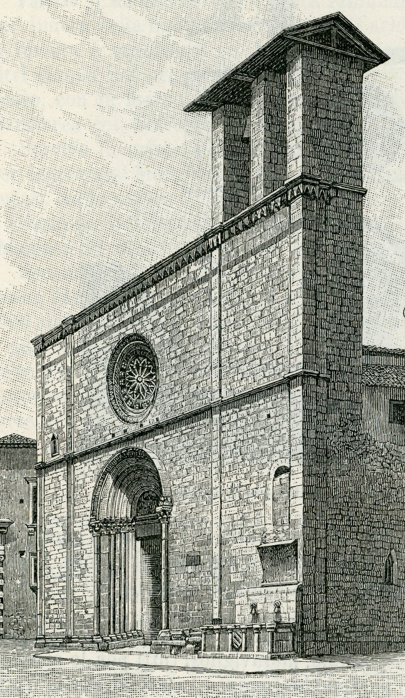 Aquila: chiesa di Santa Giusta (incisore anonimo 1899).